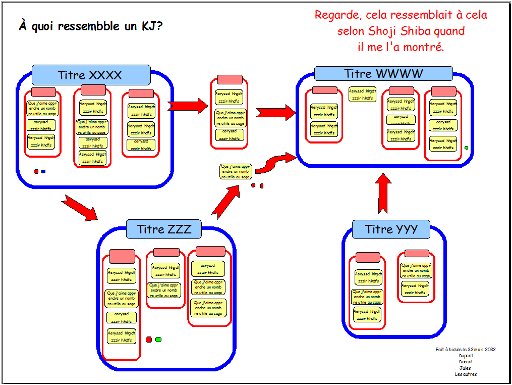 un facsimilé de KJ tels que produit par Shoji Shiba